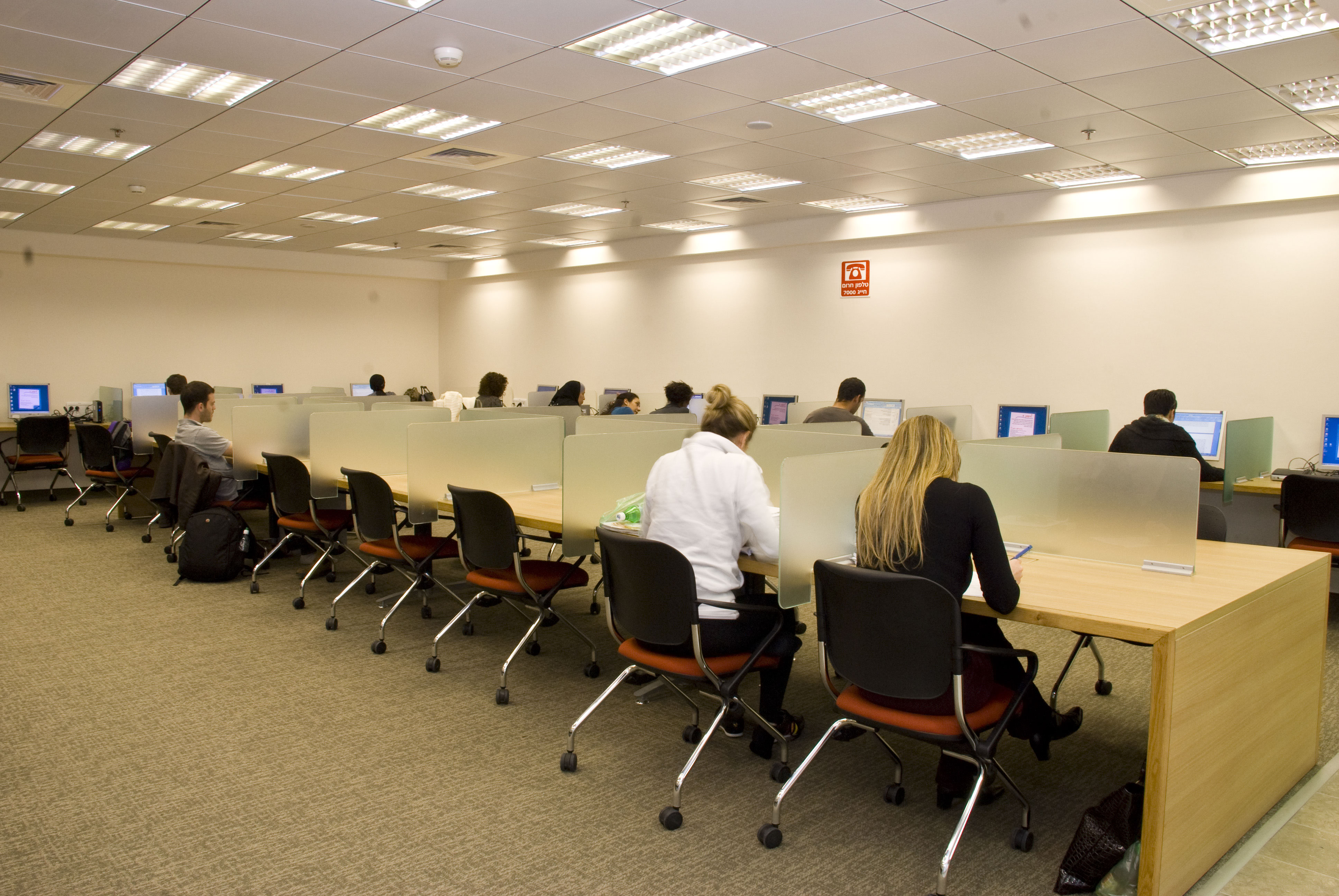 אולם הקריאה באגף החדש של הספרייה